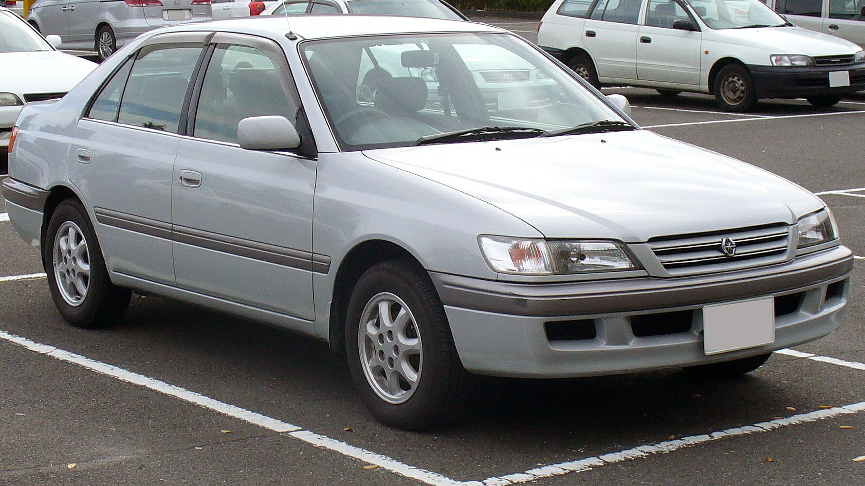 トヨタ・コロナプレミオ（前期型）